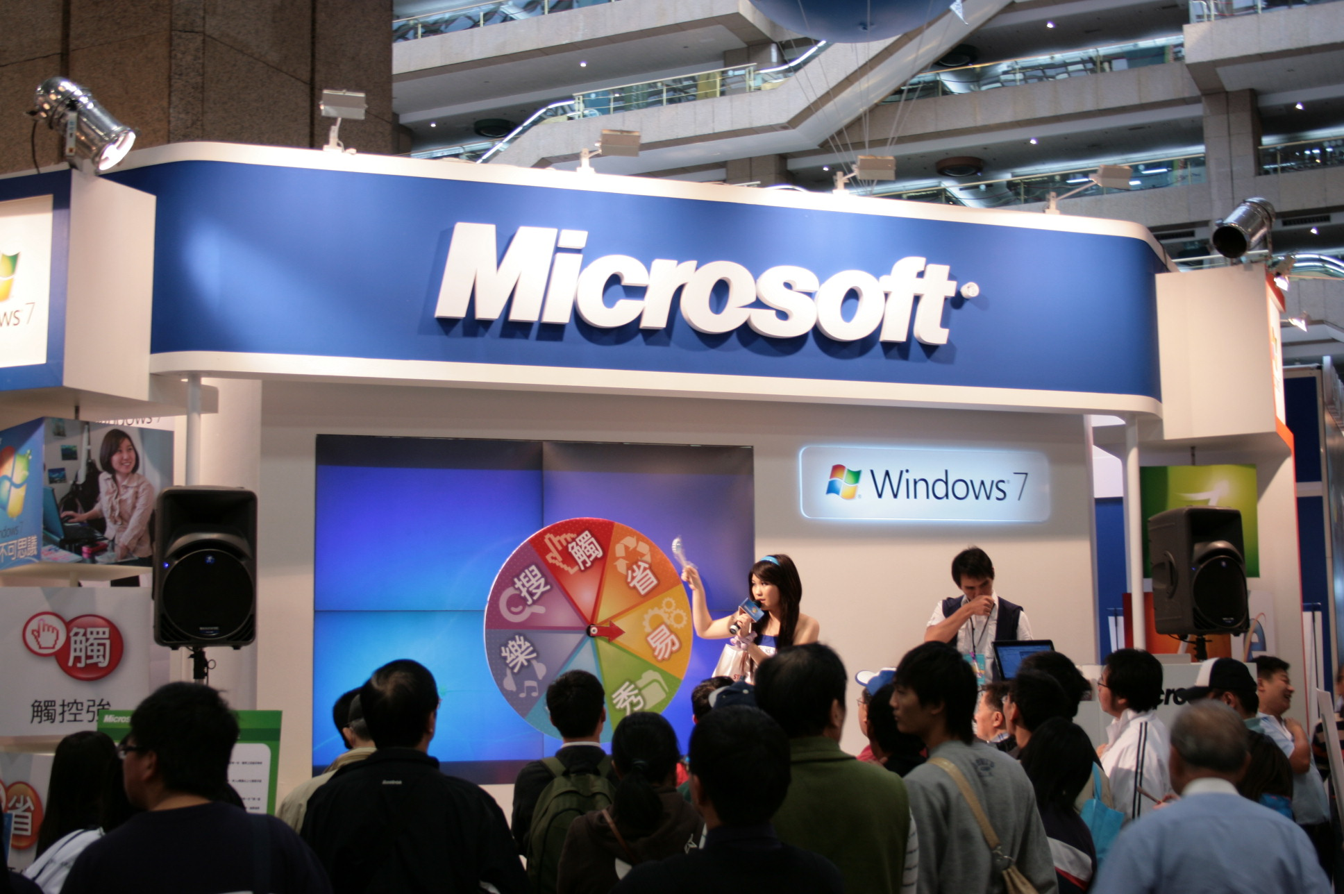 2009年台北資訊月，台灣微軟展場舞台活動宣傳Windows 7。